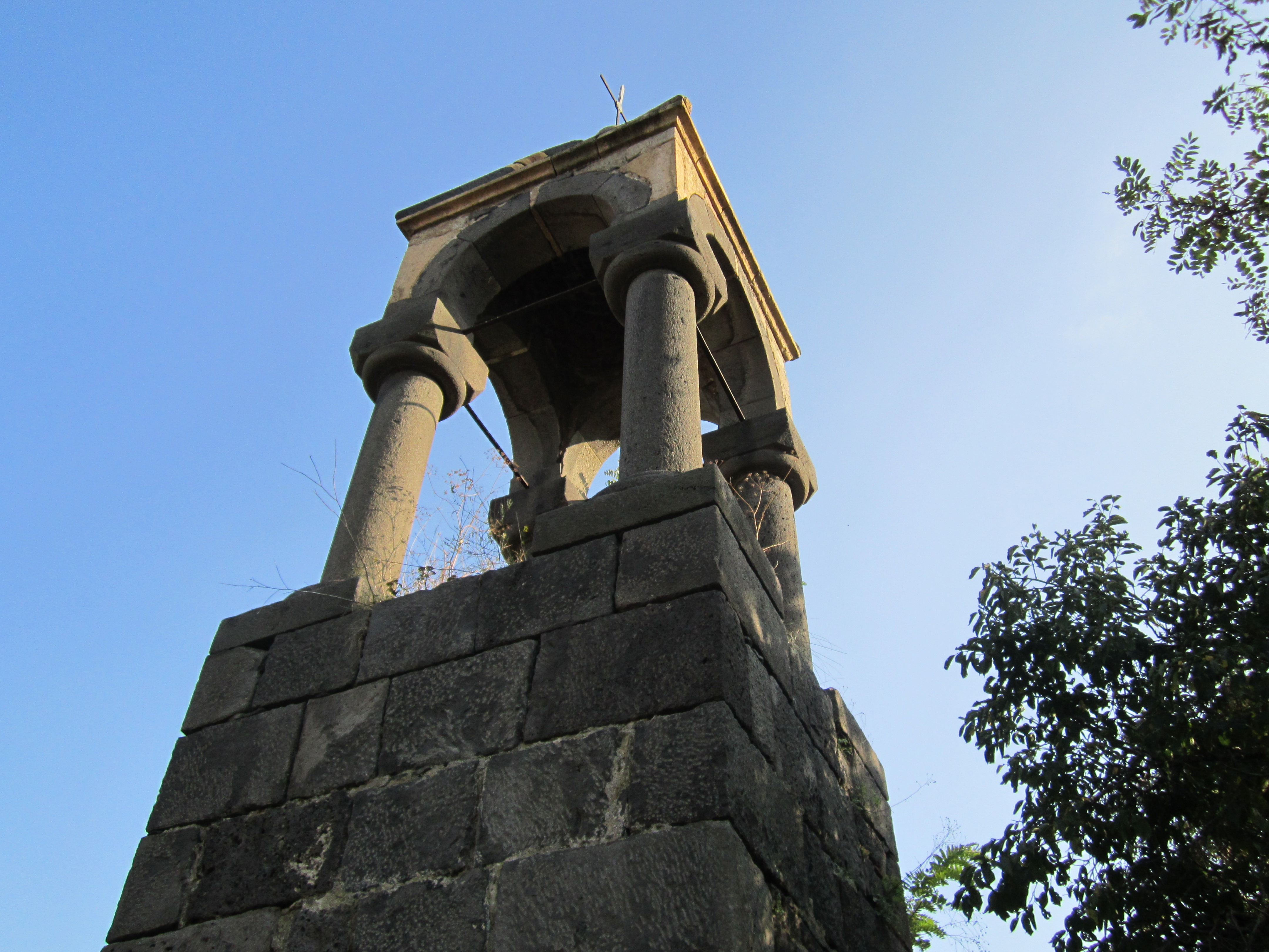 Կուրթան Սուրբ Աստվածածին եկեղեցի 57/7